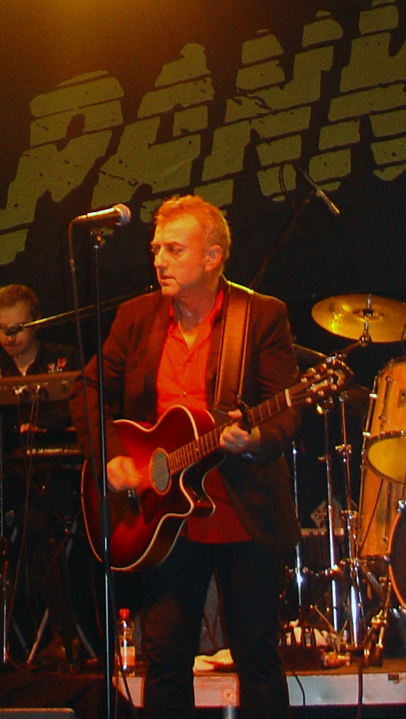 André Herzberg beim Pankow Konzert 2011 im alten Schlachthof in Dresden